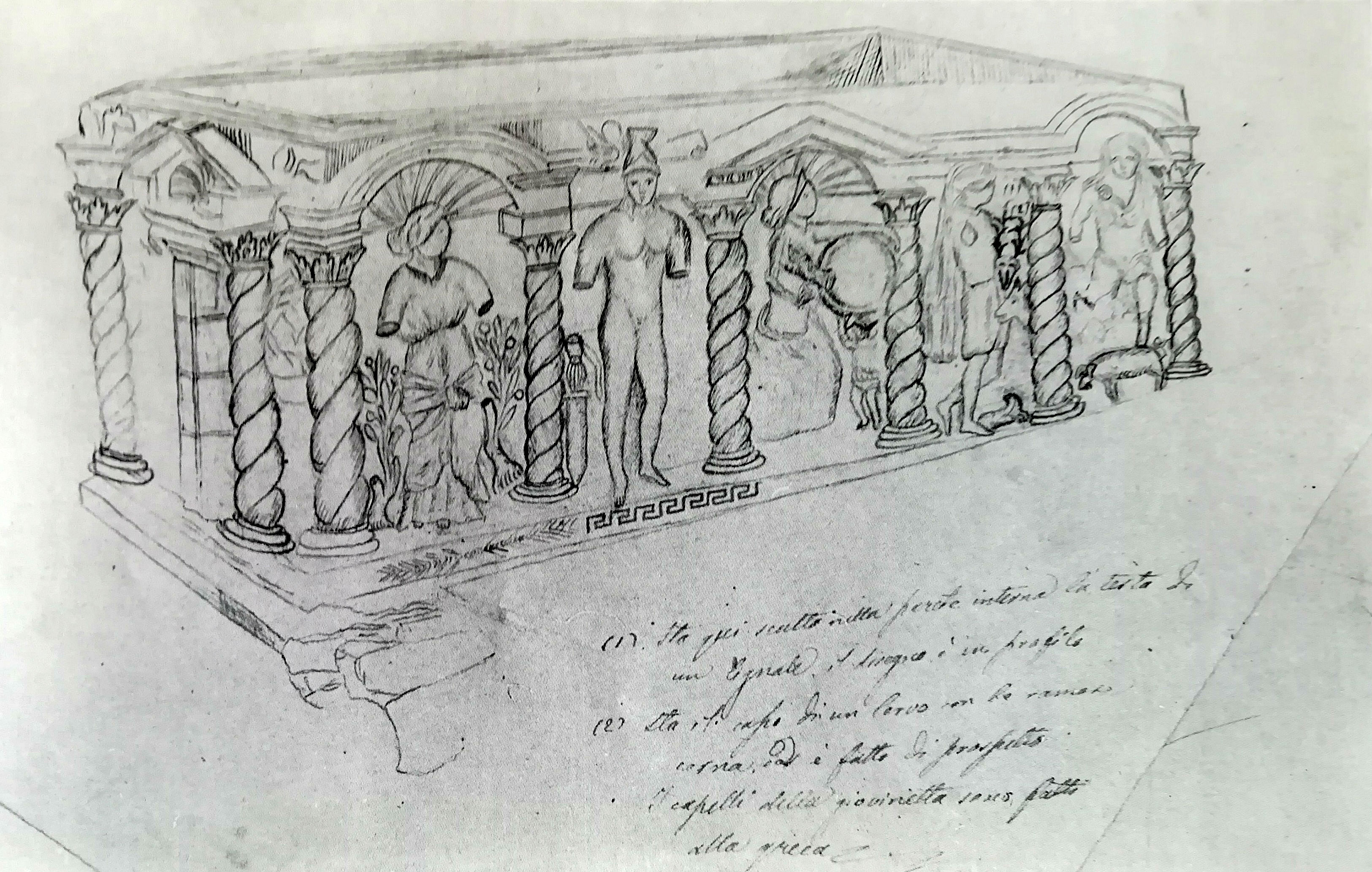 Sracofago di Melfi - Disegno